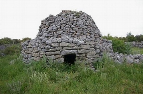 chozo de pastor